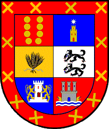 Escudo de la familia Belluga y Moncada. Marqués de la Torre del Barco.